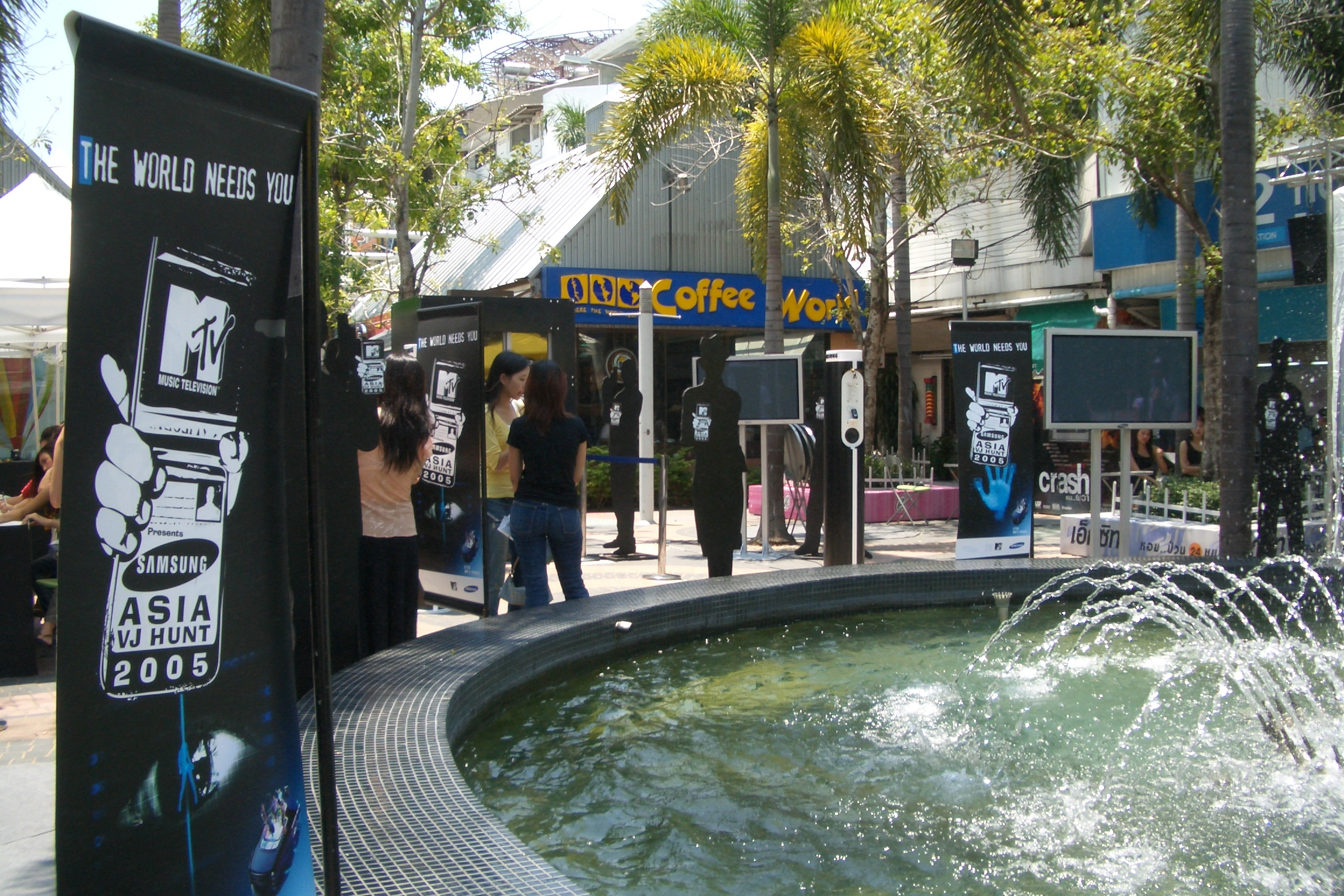 Center Point 2005